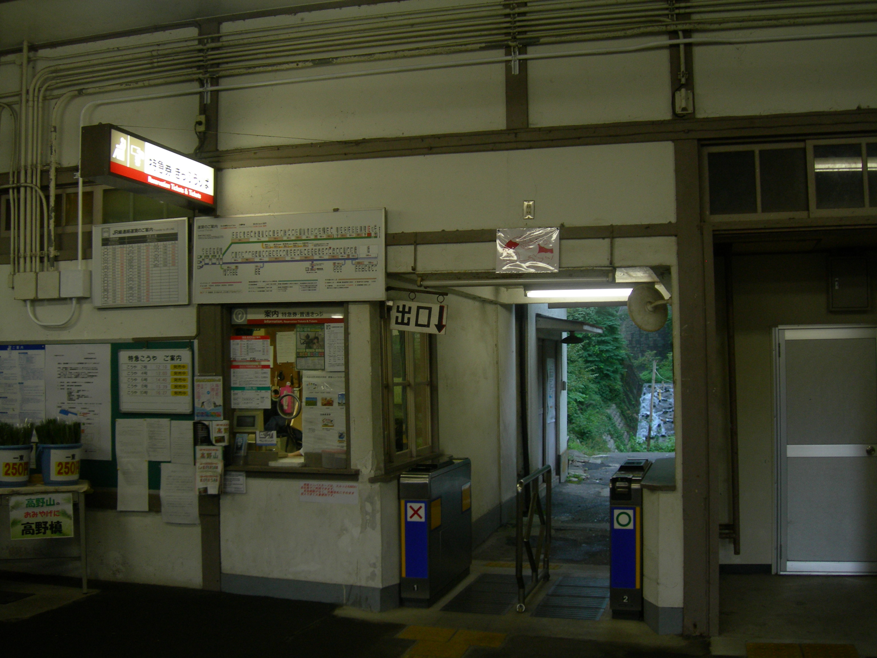 極楽橋駅 (和歌山県)改札口